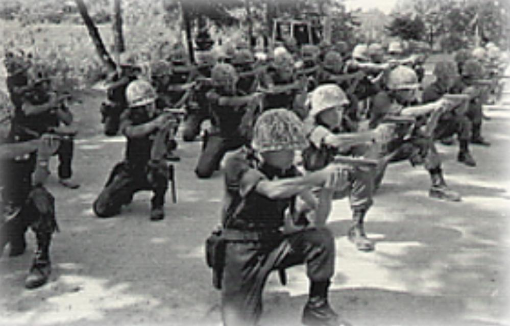 학사1기생 훈련모습